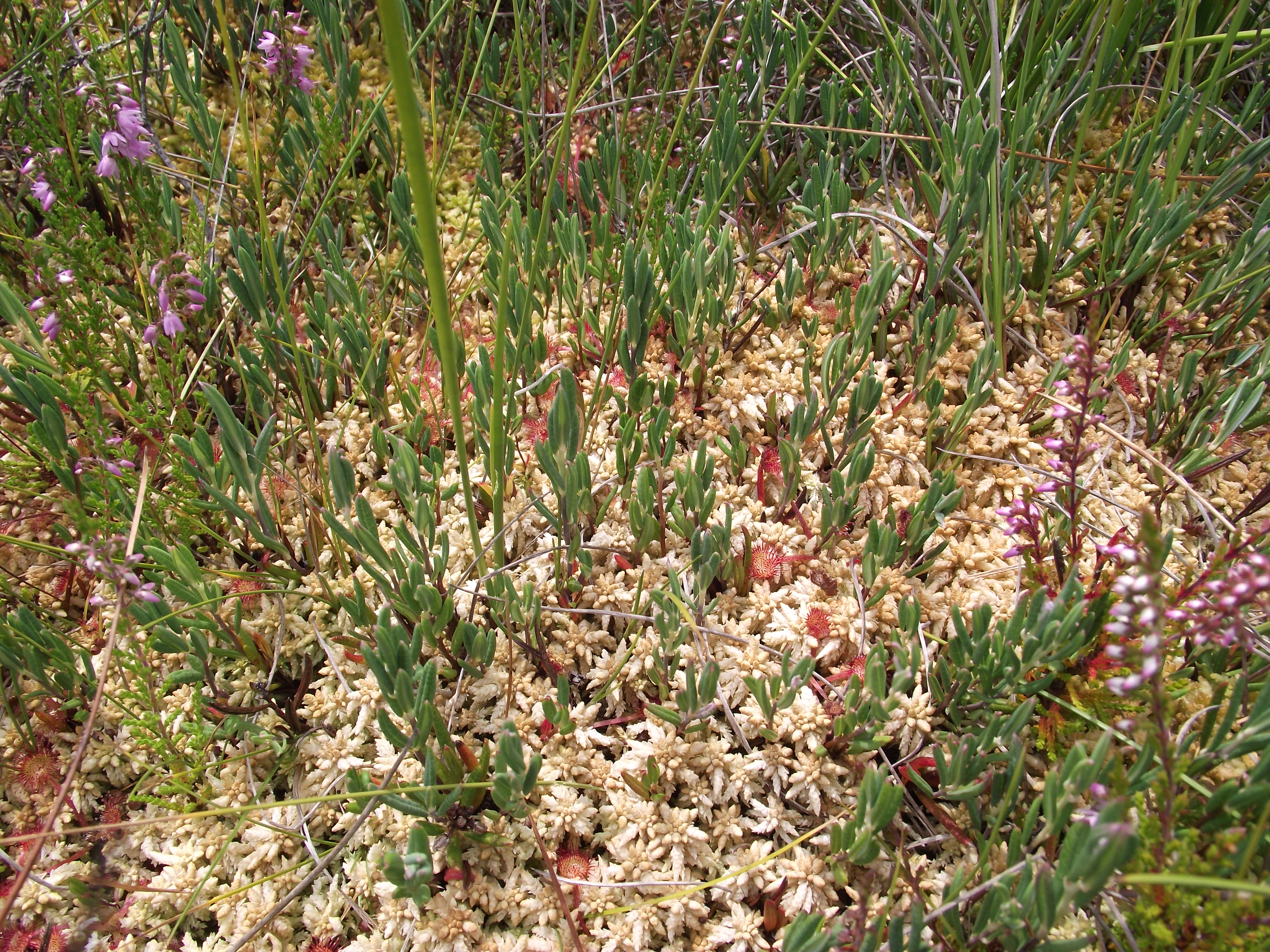 Andromeda polifolia dans une tourbière de la forêt de Laguiole (Aubrac, Massif central)